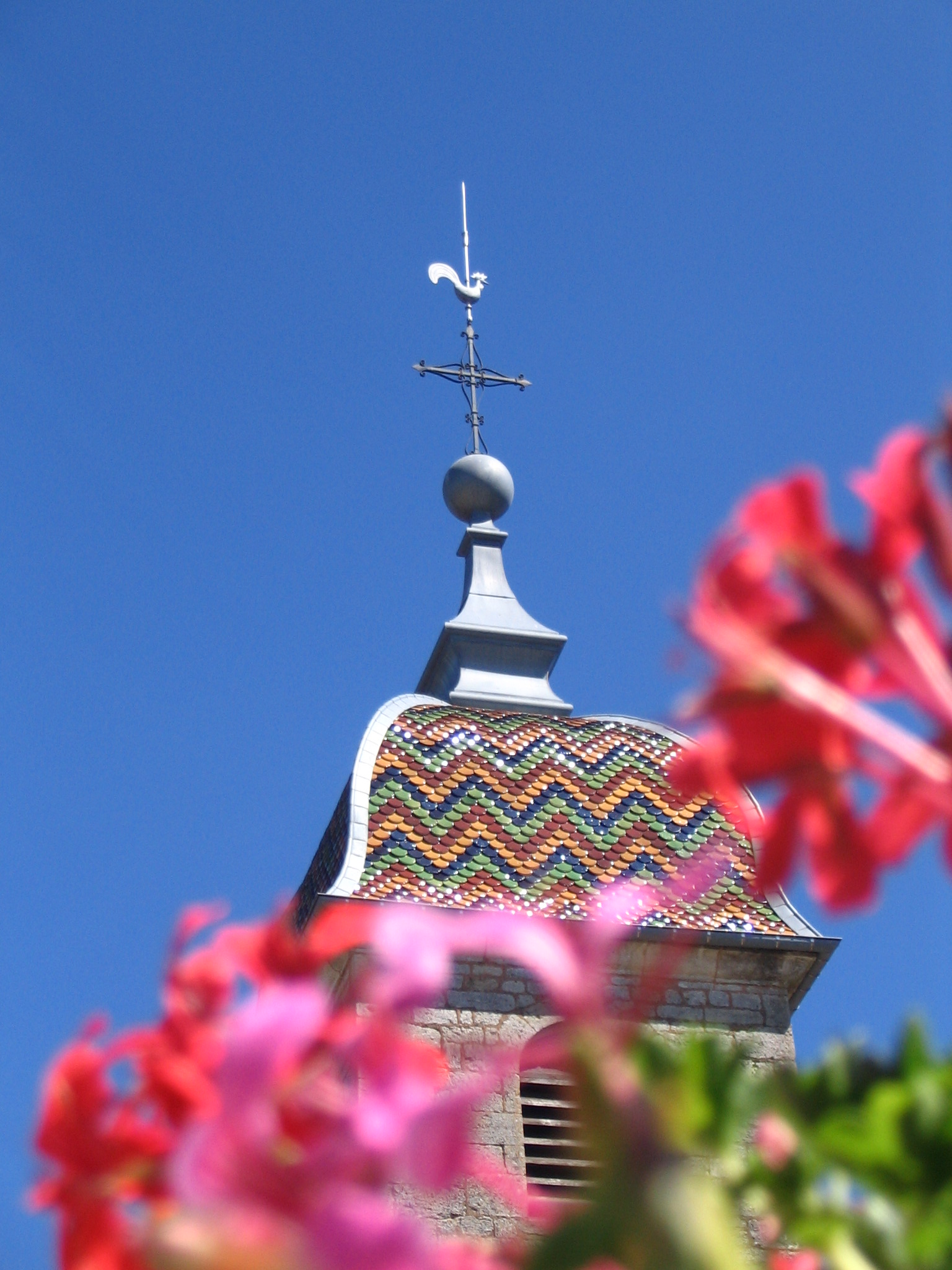 Clocher de vy les Rupt